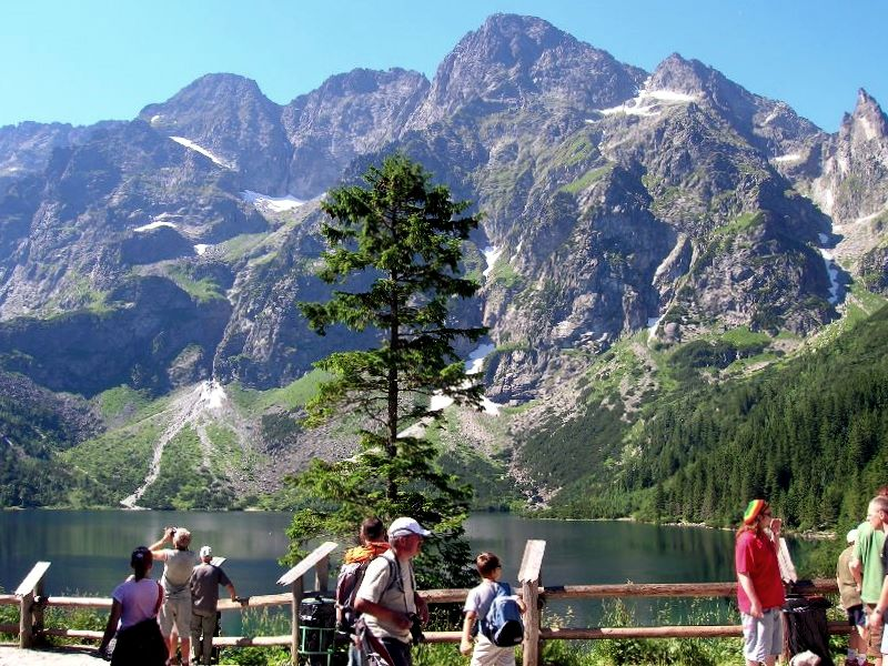 Tatry - Morskie Oko.